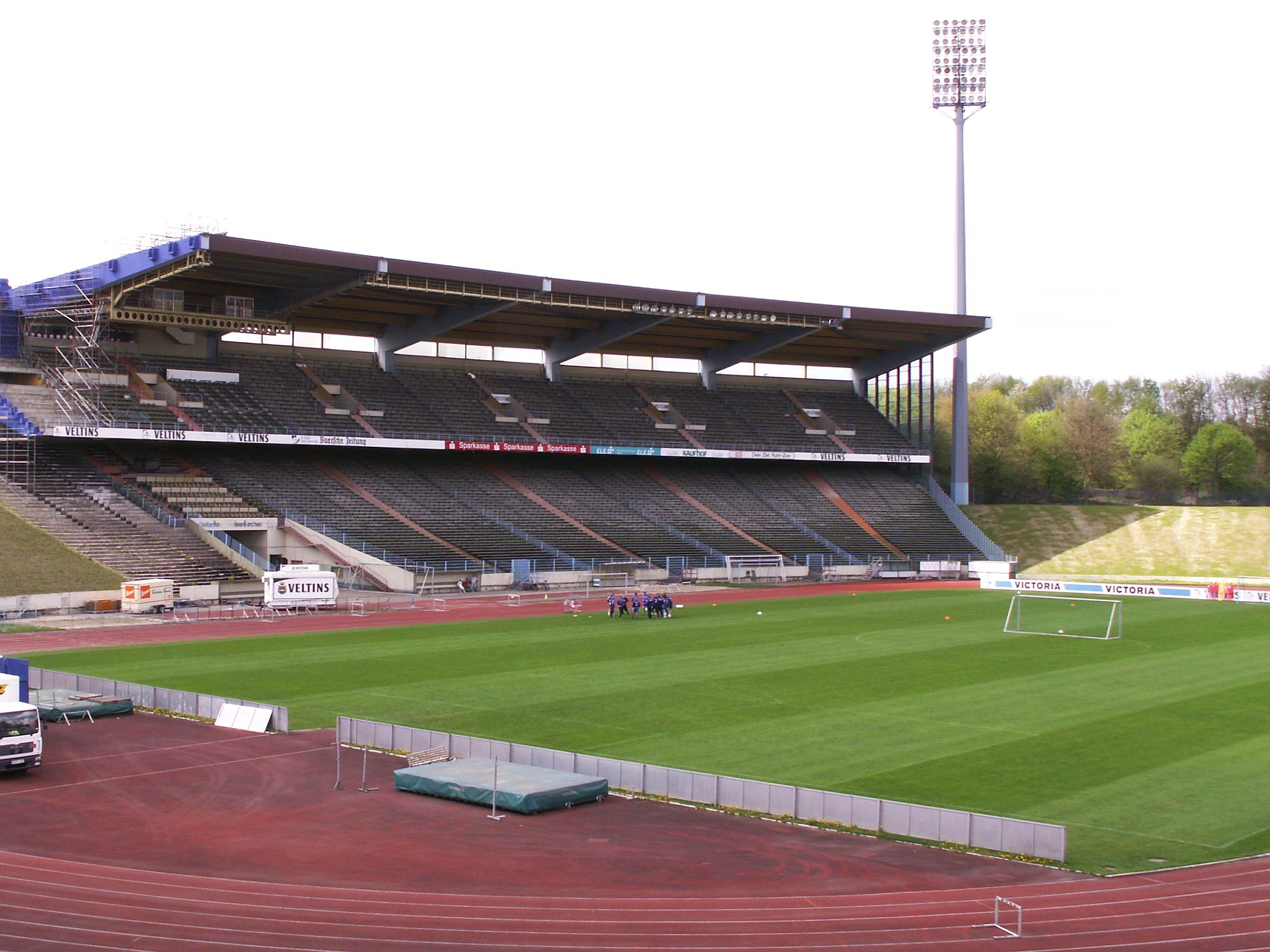 Parkstadion auf Schalke in Gelsenkirchen - Beginn Rückbau der Haupttribüne - Foto 2006 Wolfgang Pehlemann Steinberg PICT0049